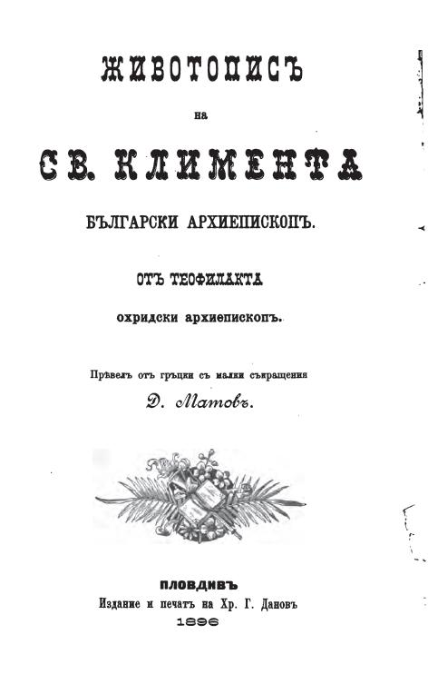 Животопис на св. Климента, български архиепископ. От Теофилакта, Охридски архиепископ. Превел от гръцки с малки съкращения Д. Матов. Пловдив, 1896